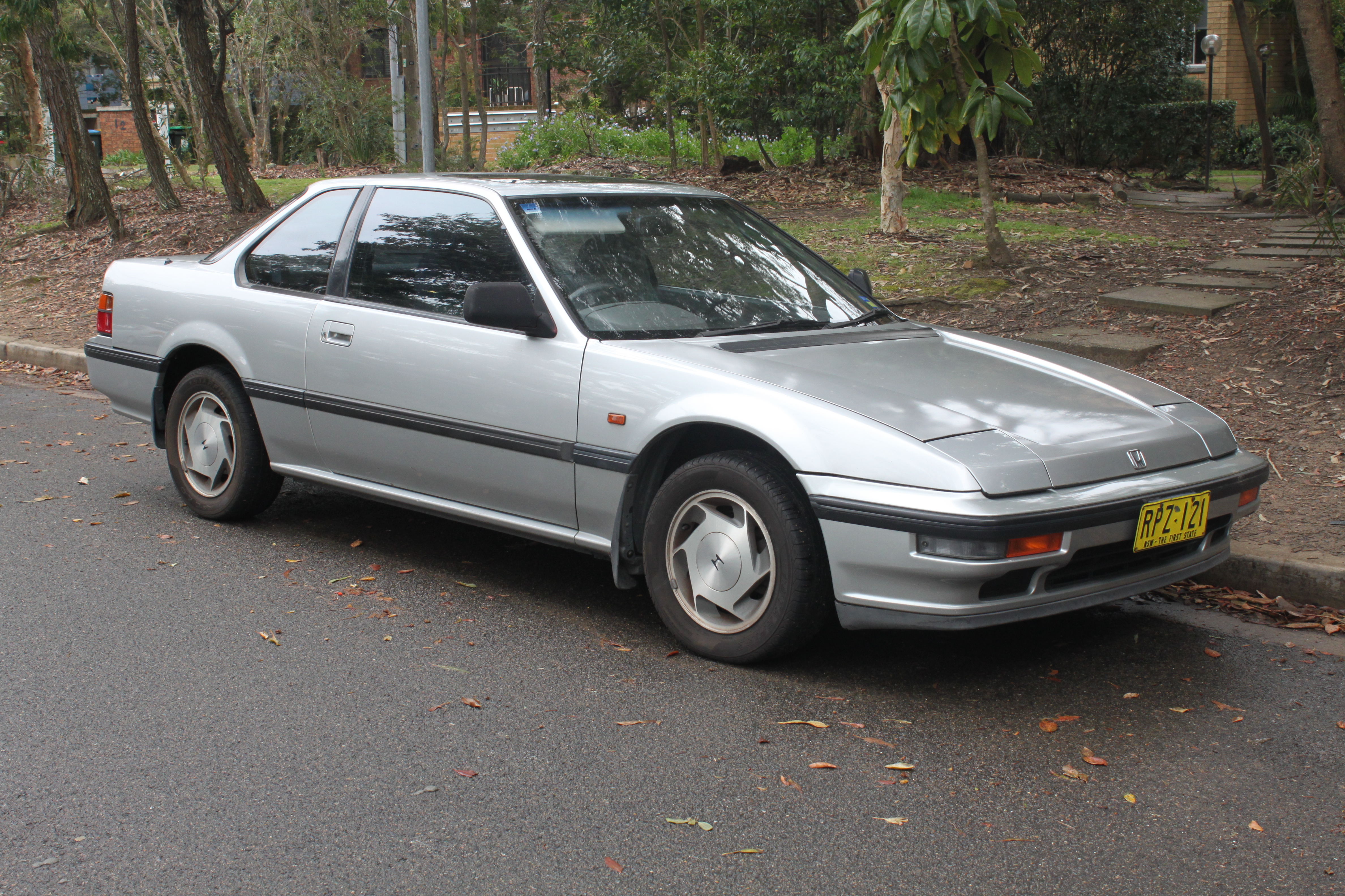 1989 Honda Prelude 4WS 2.0 Si